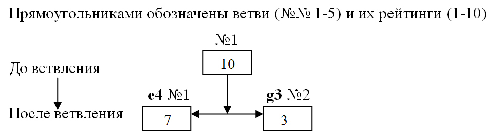 Схема Ветвления при игре в Деловые шахматы